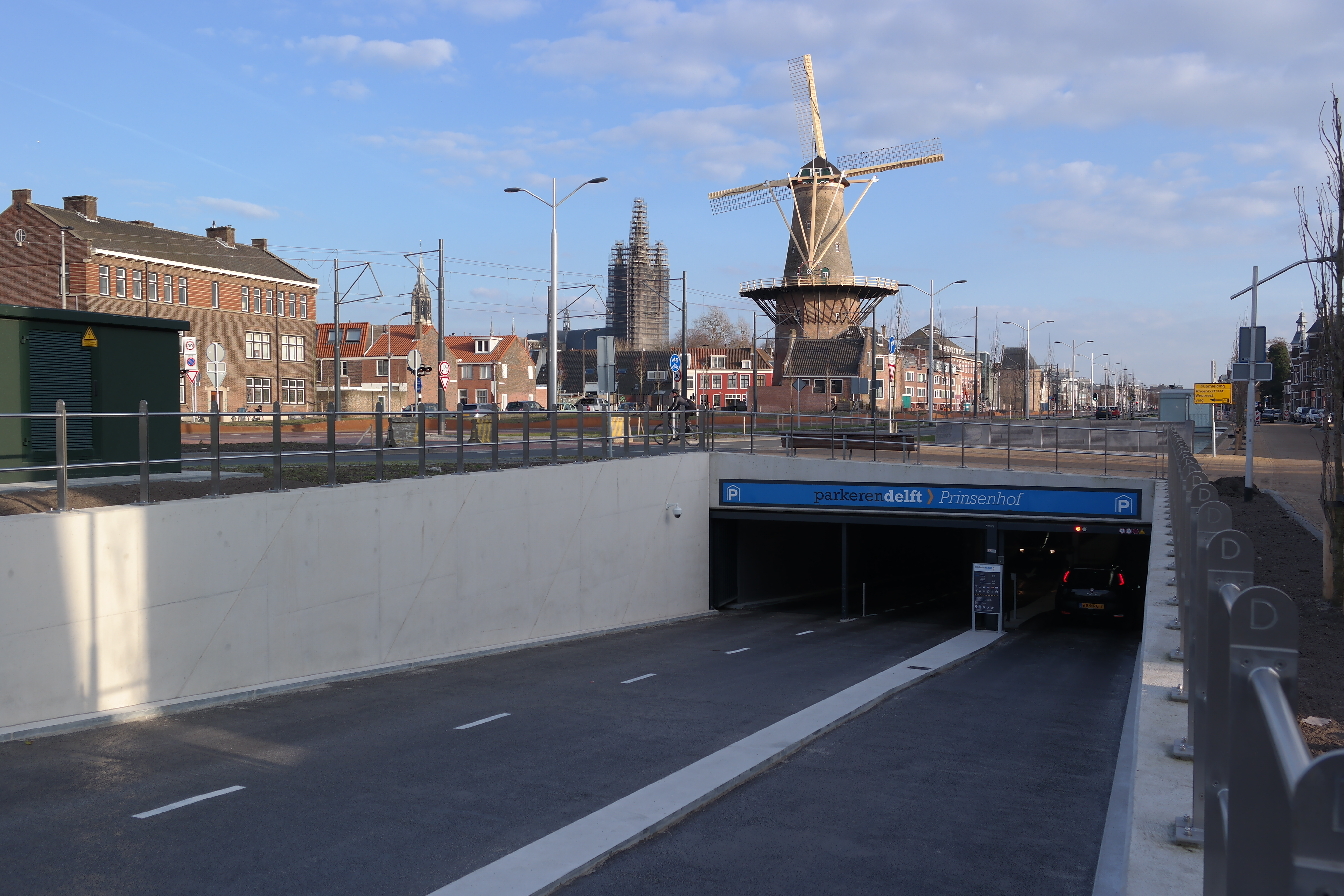 De entree van de Spoorsingelparkeergarage in Delft.